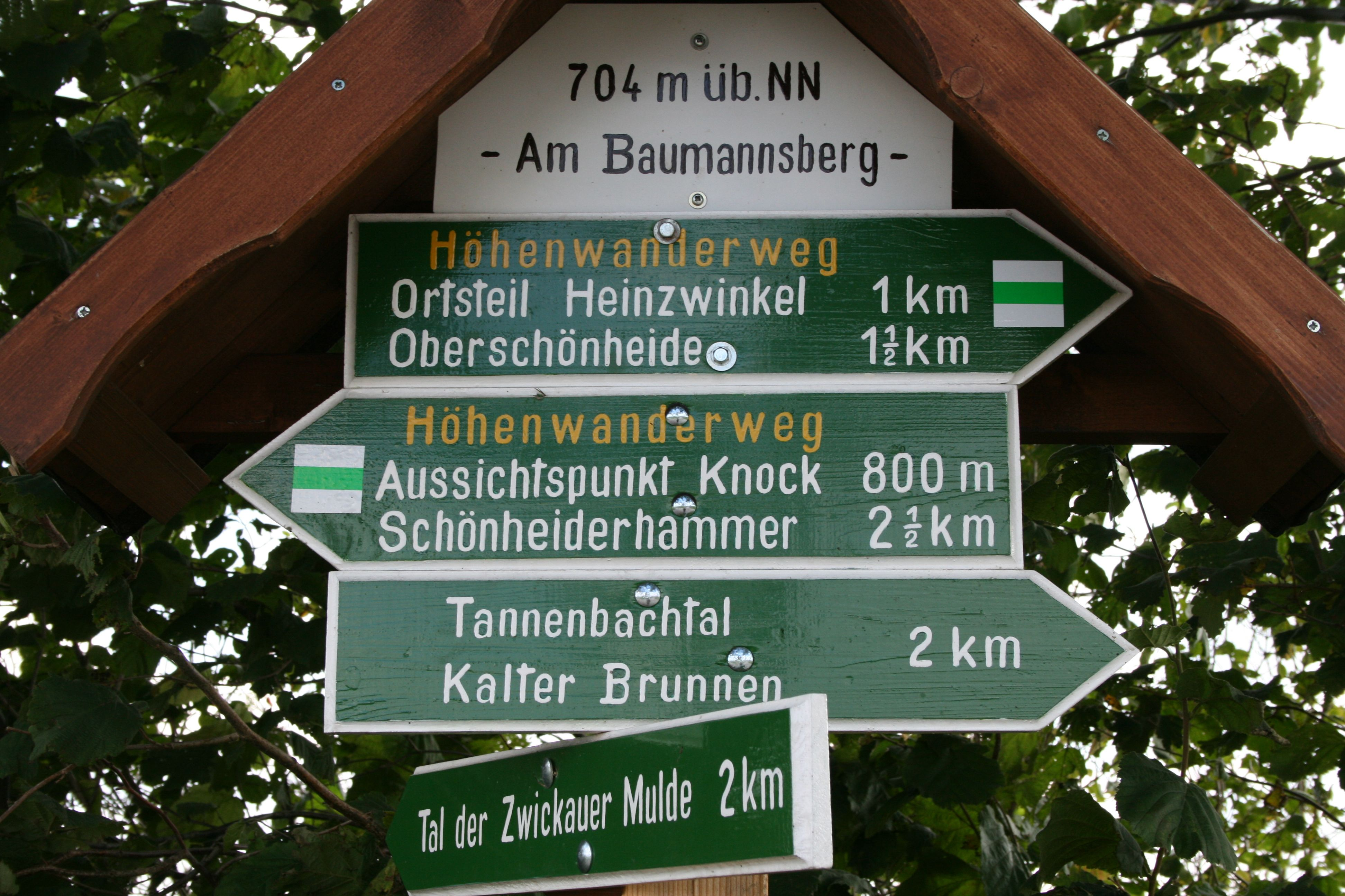 Wegweiser (am Lenkensweg Ecke Fichzigweg) für Wandernde ins Tal der Zwickauer Mulde (mit Anschluß an den Fernwanderweg Görlitz-Greiz), zu den Forellengewässern wie Tannenbach und Silberbach, nach Oberschönheide, dort findet sich ein Anschluß an den Fernwanderweg Eisenach-Budapest.